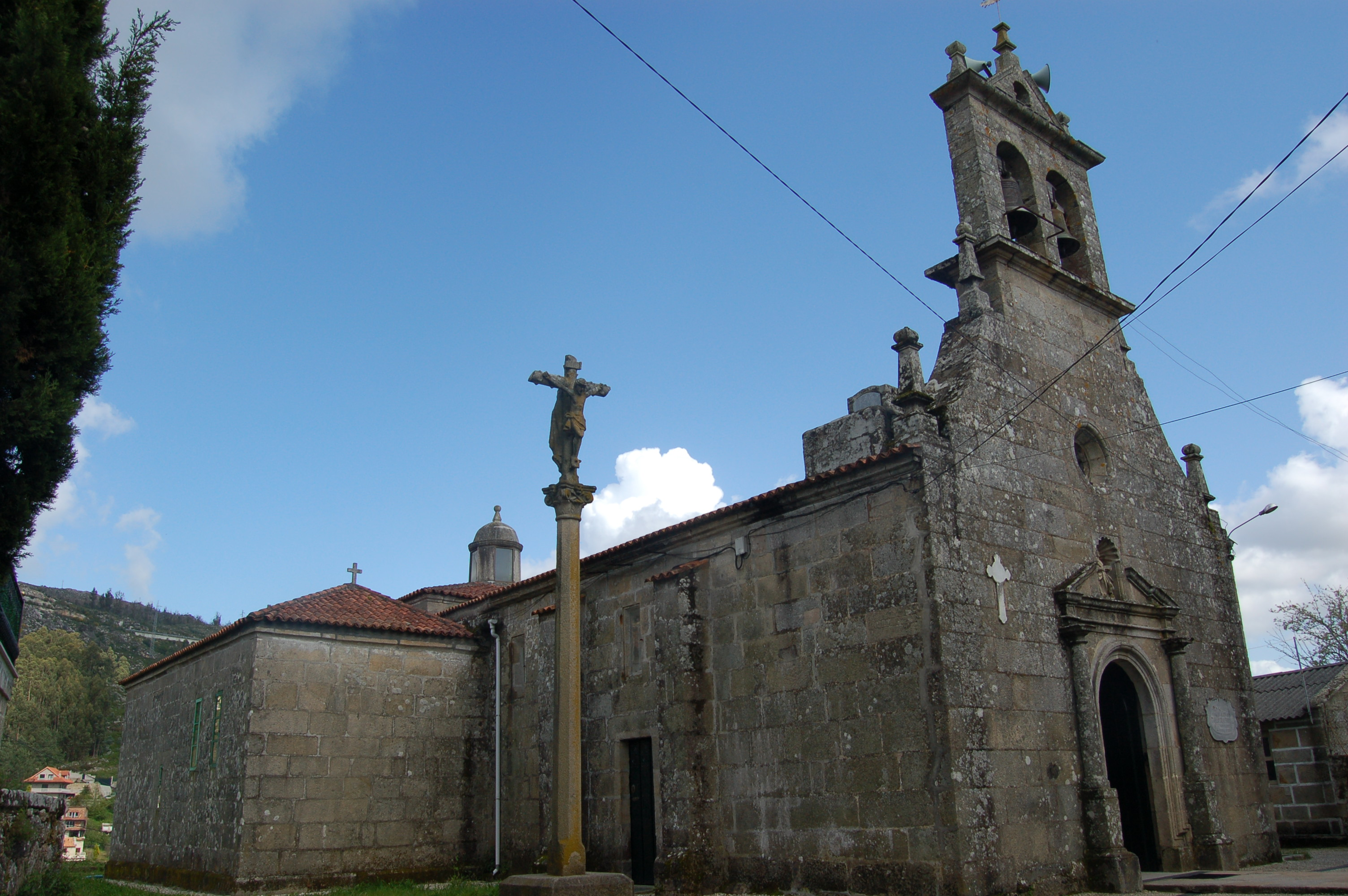 Igrexa parroquial de Santa Eulalia de Meira (Moaña)